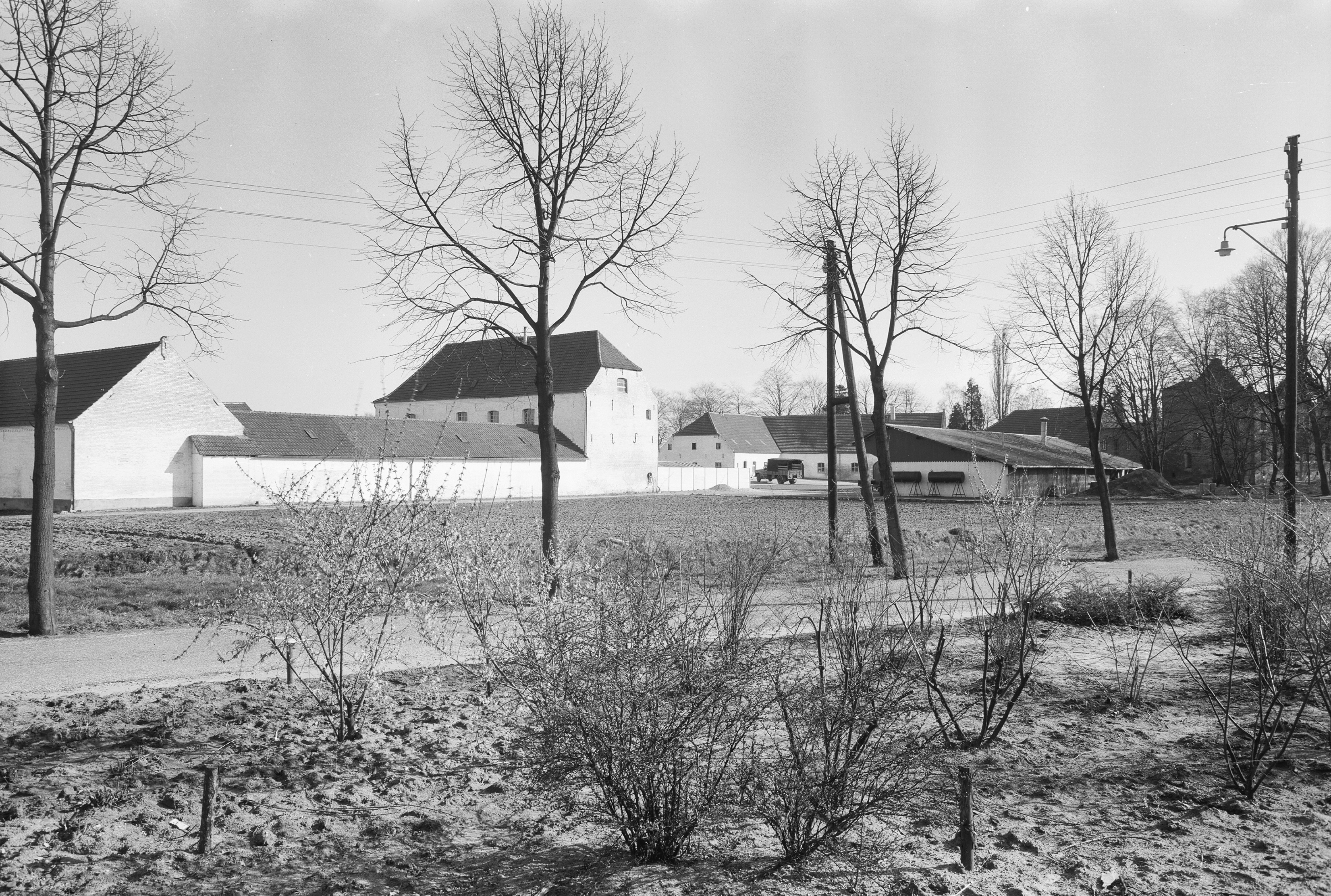 Voormalig Klooster Mariaschoot: Voort 6